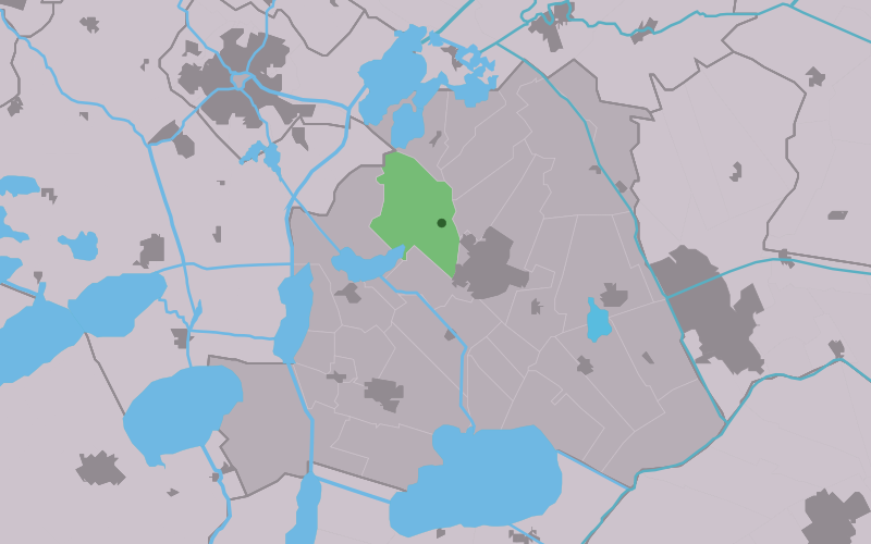 Kaartsje fan himrik fan De_Broek